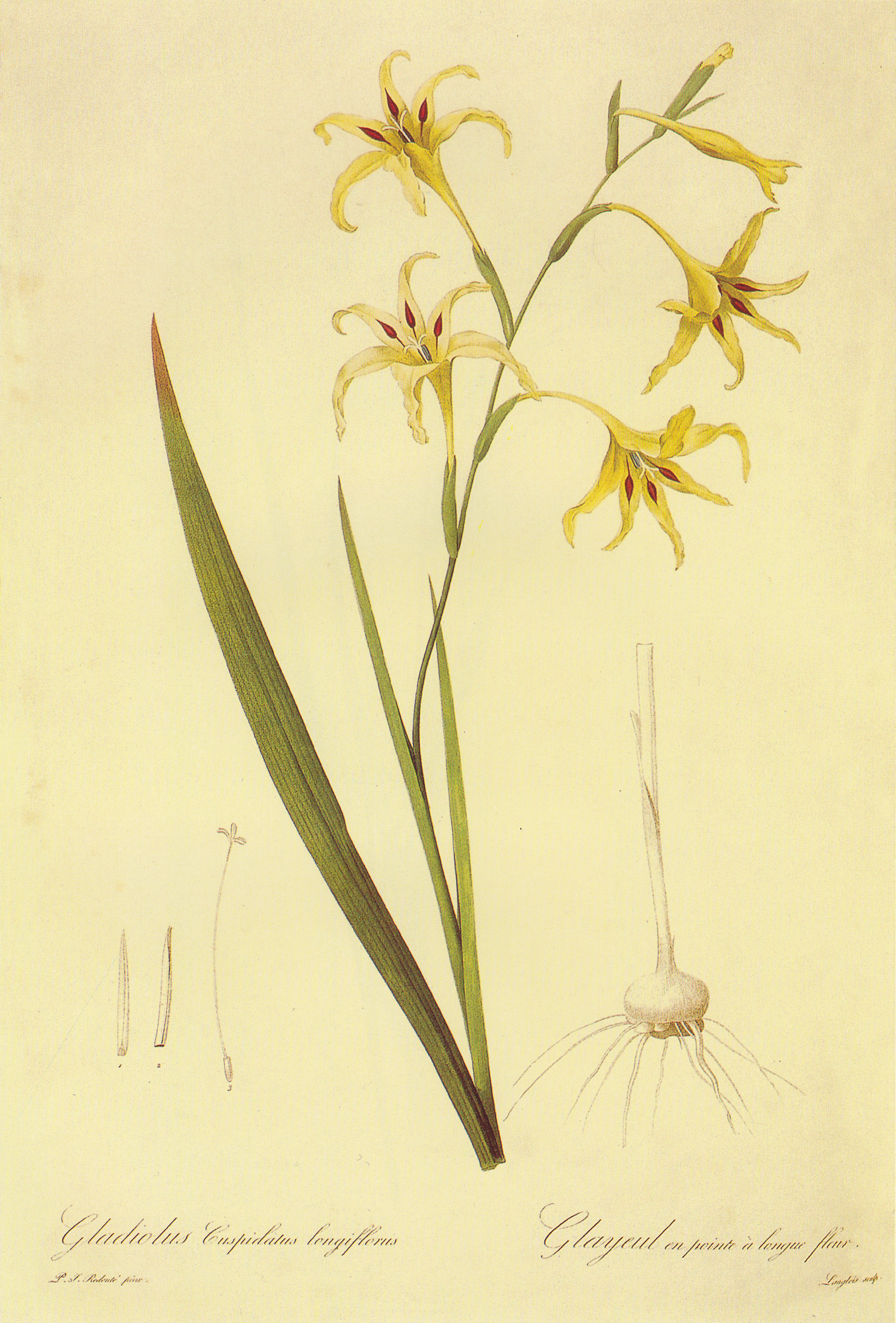 凌波美人。原产于非洲。